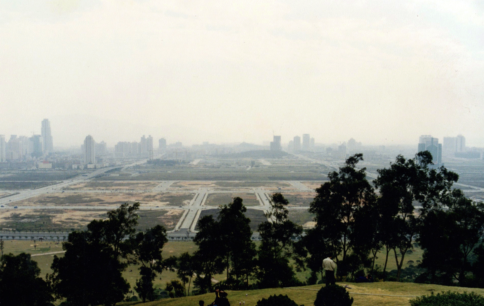 1998年春节莲花山顶 Shenzhen 1998